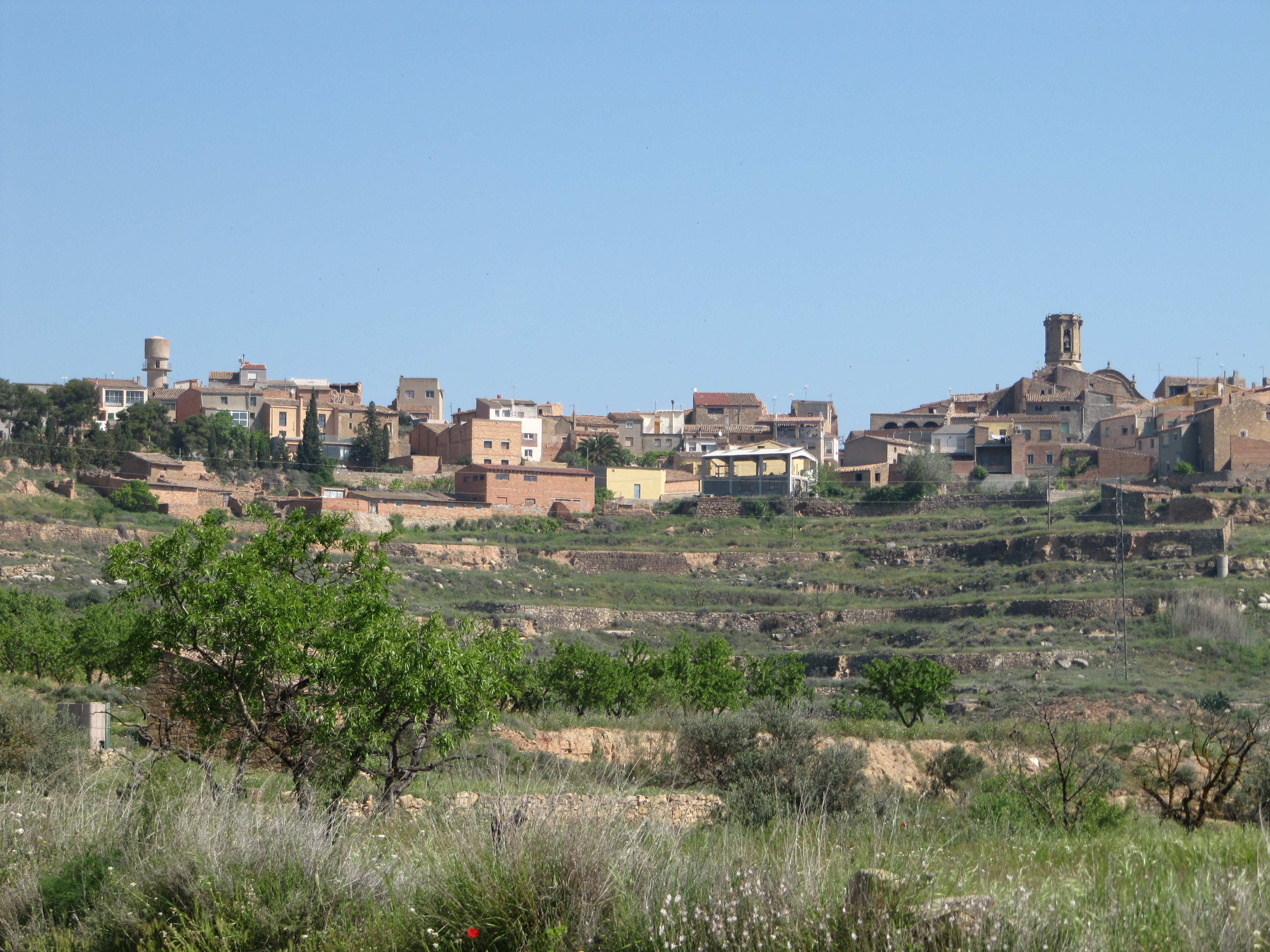 Vista desde la Vall Major